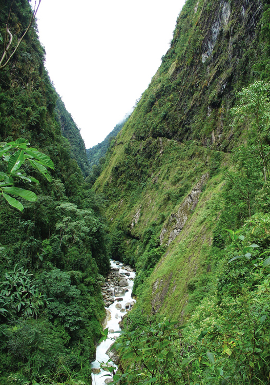 西藏林芝-老虎嘴